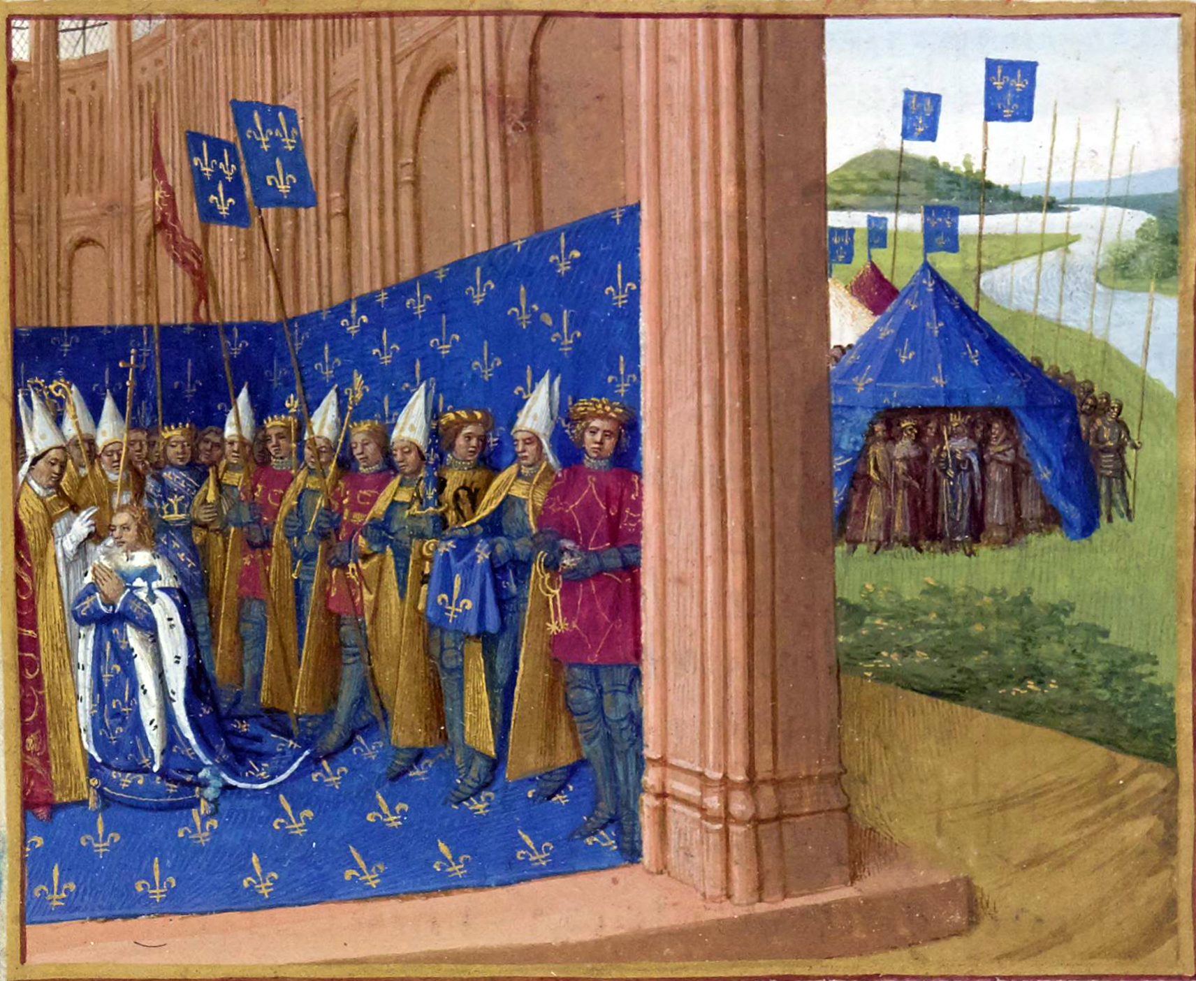 Couronnement de Lothaire. Lothaire et Richard sans Peur Grandes Chroniques de France, enluminées par Jean Fouquet, Tours, vers 1455-1460 Paris, BnF, département des Manuscrits, Français 6465, fol. 163 (Livre de Lothaire) Couronnement de Lothaire : À Reims, le 12 novembre 954, Lothaire est couronné par l'archevêque Artaud, en présence du comte de Champagne, de l'archevêque de Laon, du duc de Guyenne, de l'archevêque de Langres, du duc de Normandie, de l'évêque de Noyon, du comte de Flandre, de l'évêque de Beauvais et du comte de Toulouse. Lothaire et Richard sans Peur (en arrière-plan à droite) : Sur les bords de l'Eaulne, à l'entrée de sa tente, Lothaire s'entretient avec Richard Ier sans Peur, duc de Normandie, pour conclure la paix.